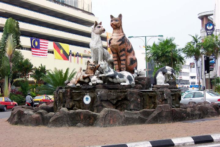 Kuching, Sarawak, Borneo, Malesia, statue di gatti